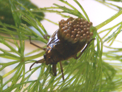 Diplonychus japonicus コオイムシ 물자라